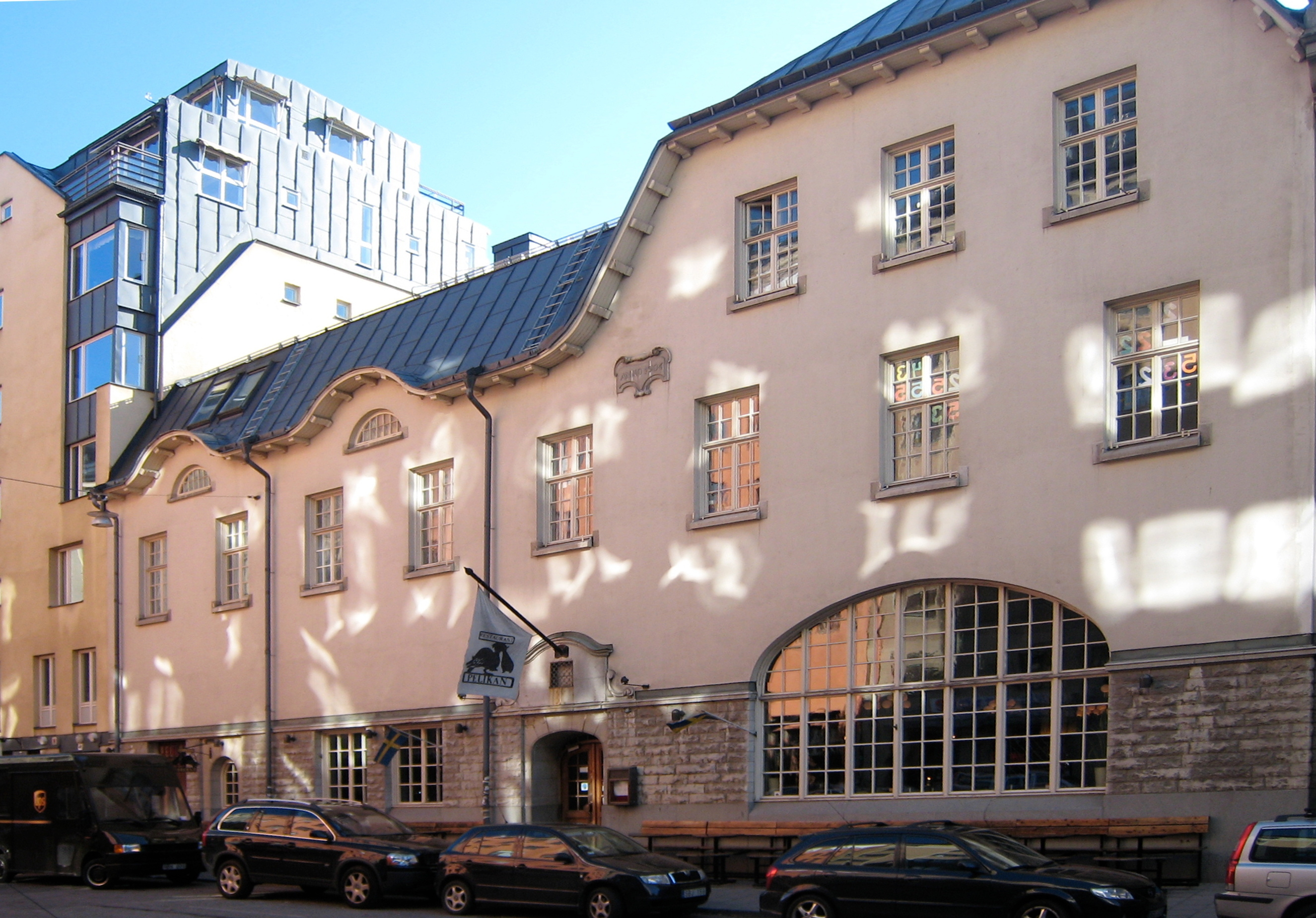 Restaurang Pelikan, Blekingegatan 40, kvarteret Obelisken 10, Södermalm, Stockholm. Arkitekt: Sam Kjellberg (1868-1939). Byggår 1904. Byggnaden uppfördes för Stockholms utskänkningsaktiebolags räkning som kroglokaler eller värdshus. .